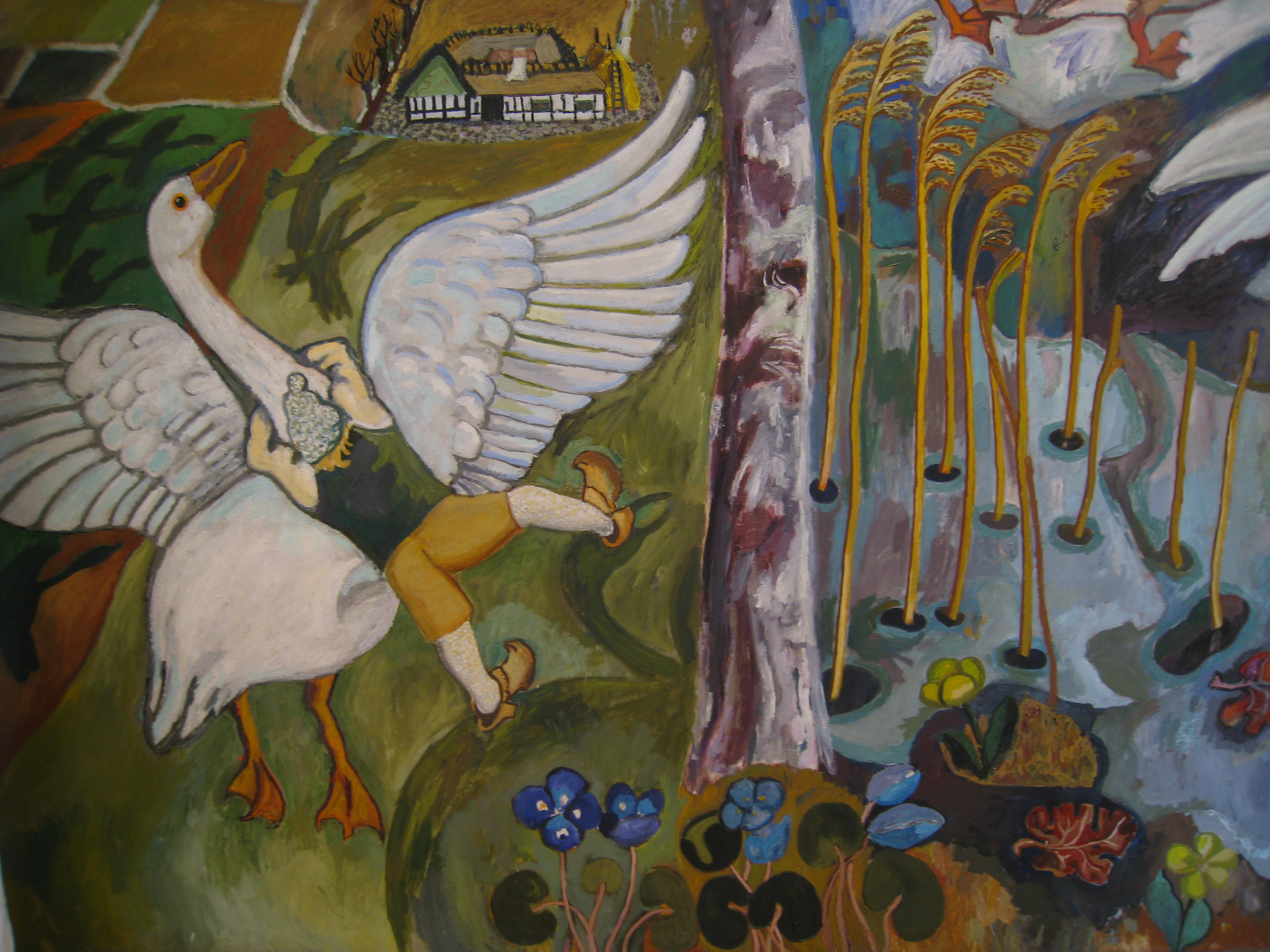 detail